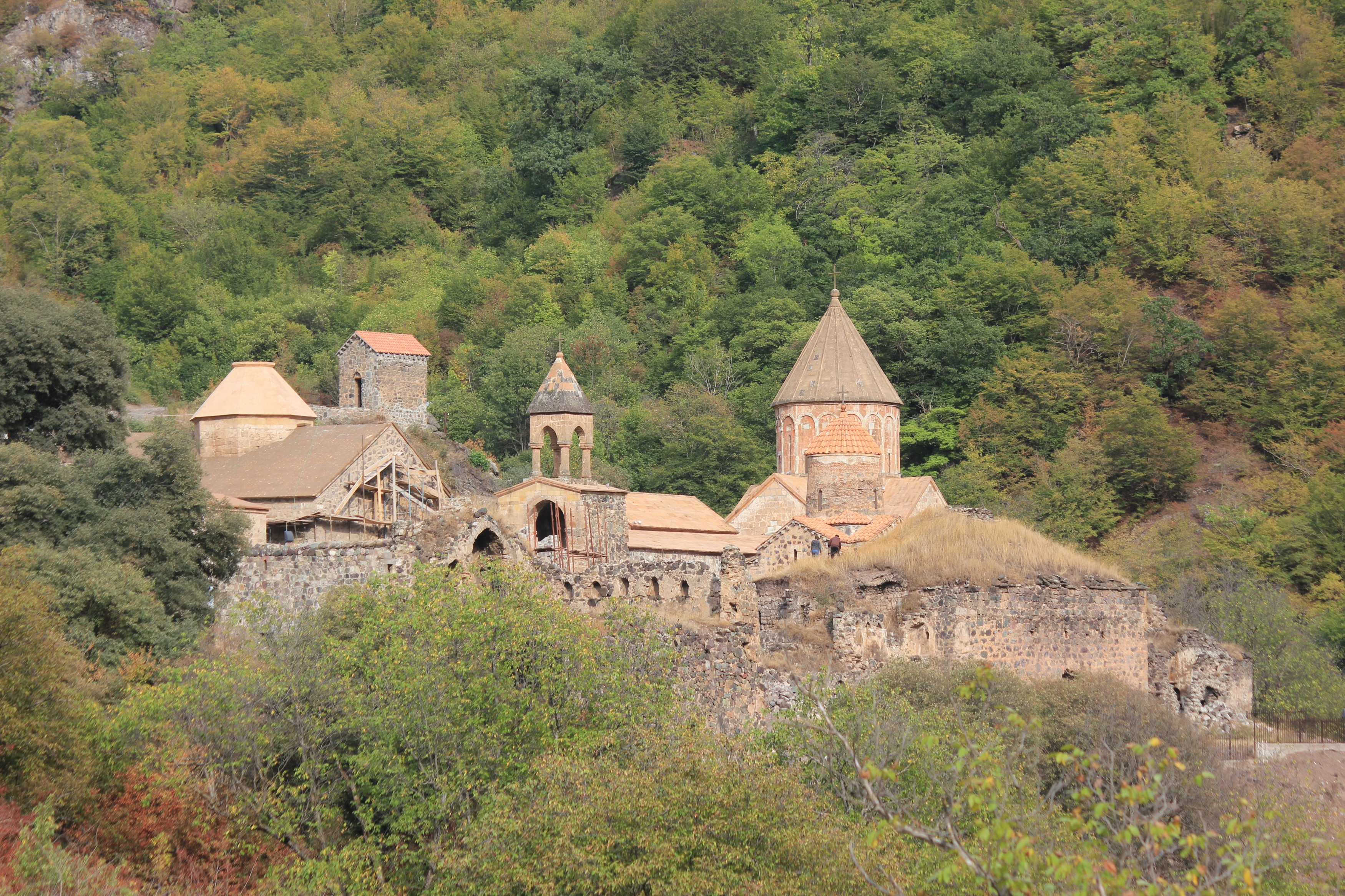 Hornjoserbsce: Klóšter Dadiwank pola Kalbadźara (Azerbajdźan/Nahórski Karabach).